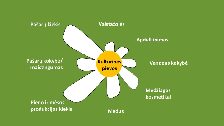 Ekosisteminės paslaugos kultūrinėse pievose